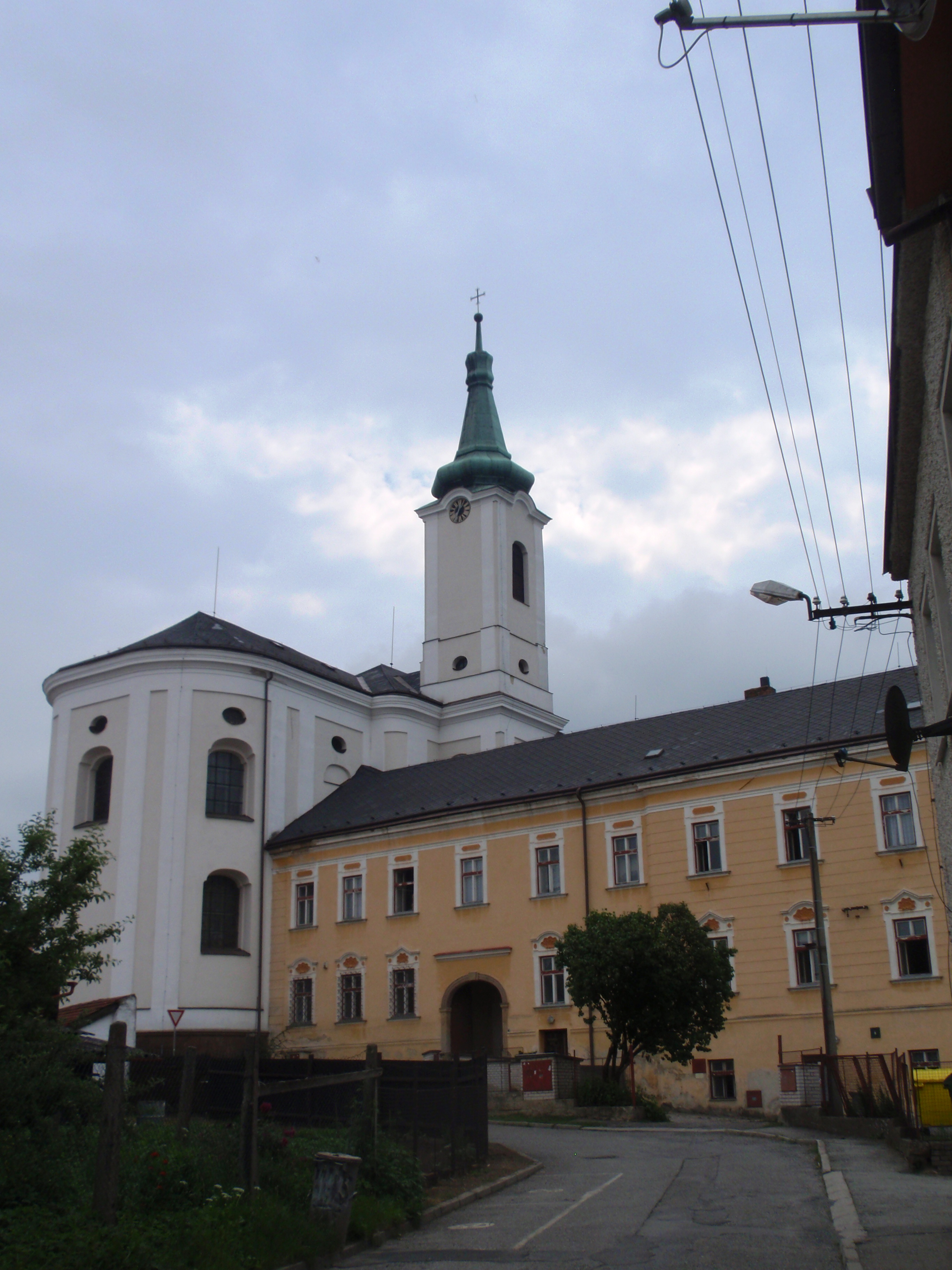 Kostel Nanebevzetí P. Marie (Jevíčko), ul. Kostelní, Jevíčko